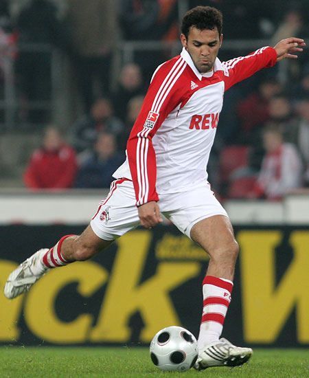 Roda Antar - 27. Spieltag, Derby gegen Borussia Mönchengladbach